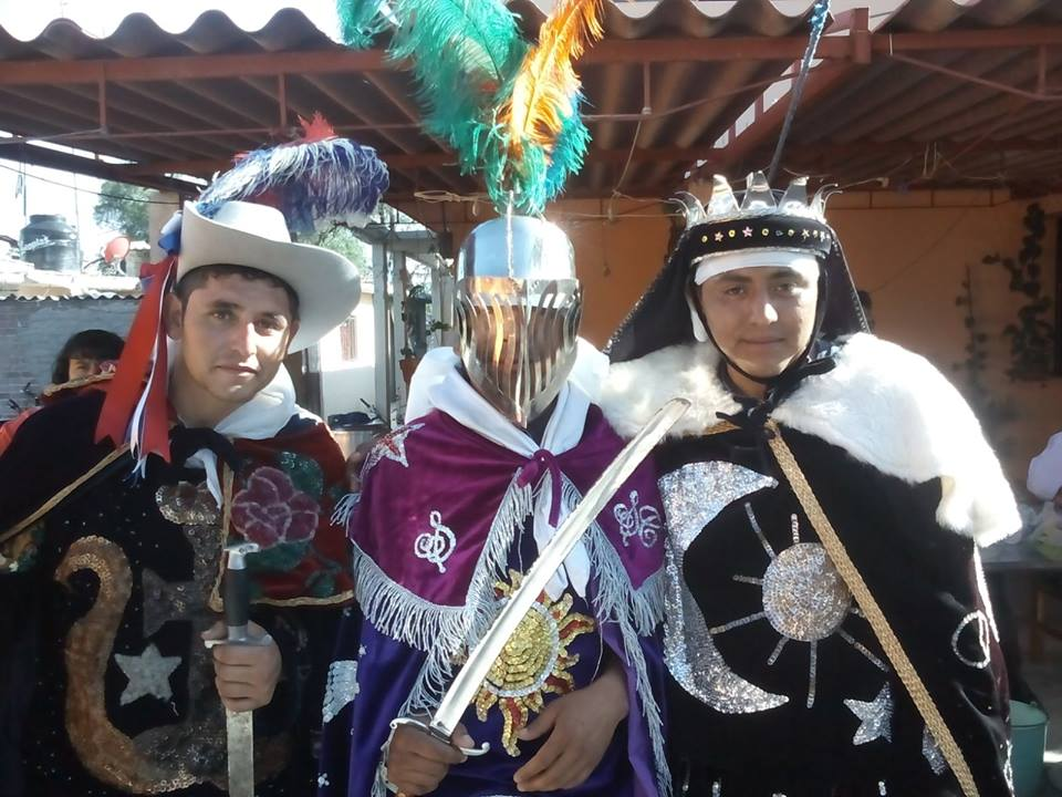 Rey cristiano y rey moro